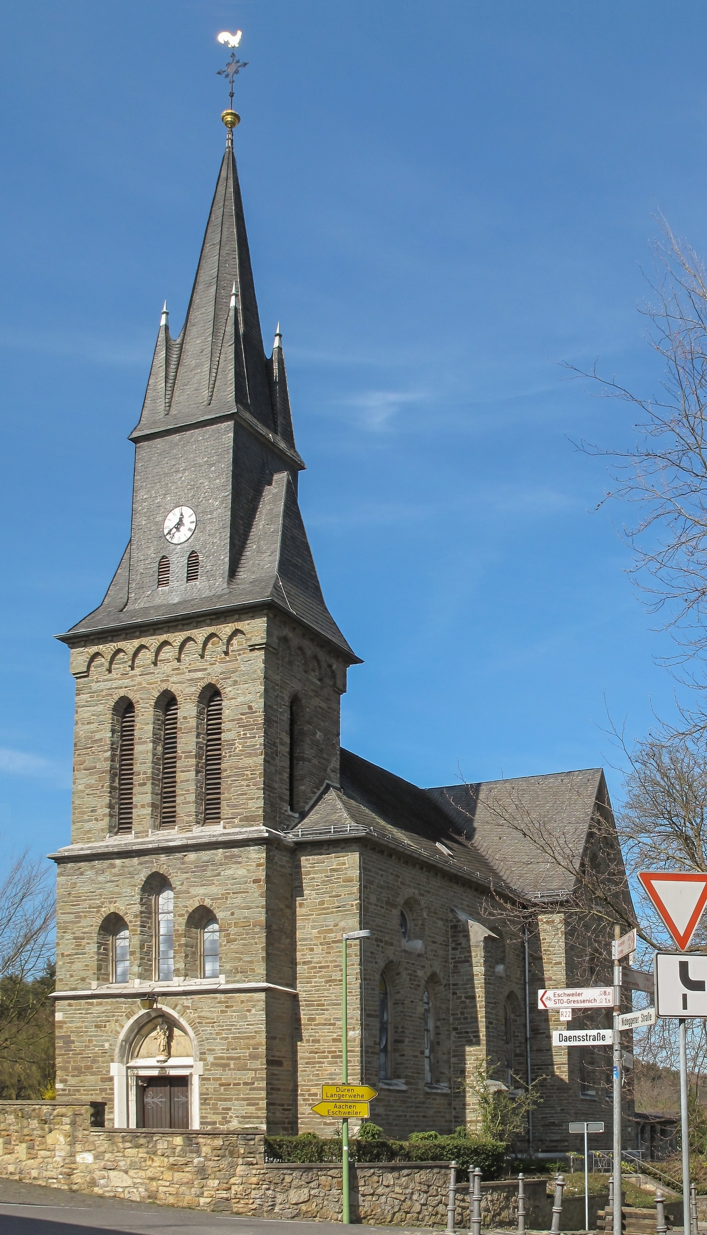 Schevenhütte, kath. Kirche St. Josef